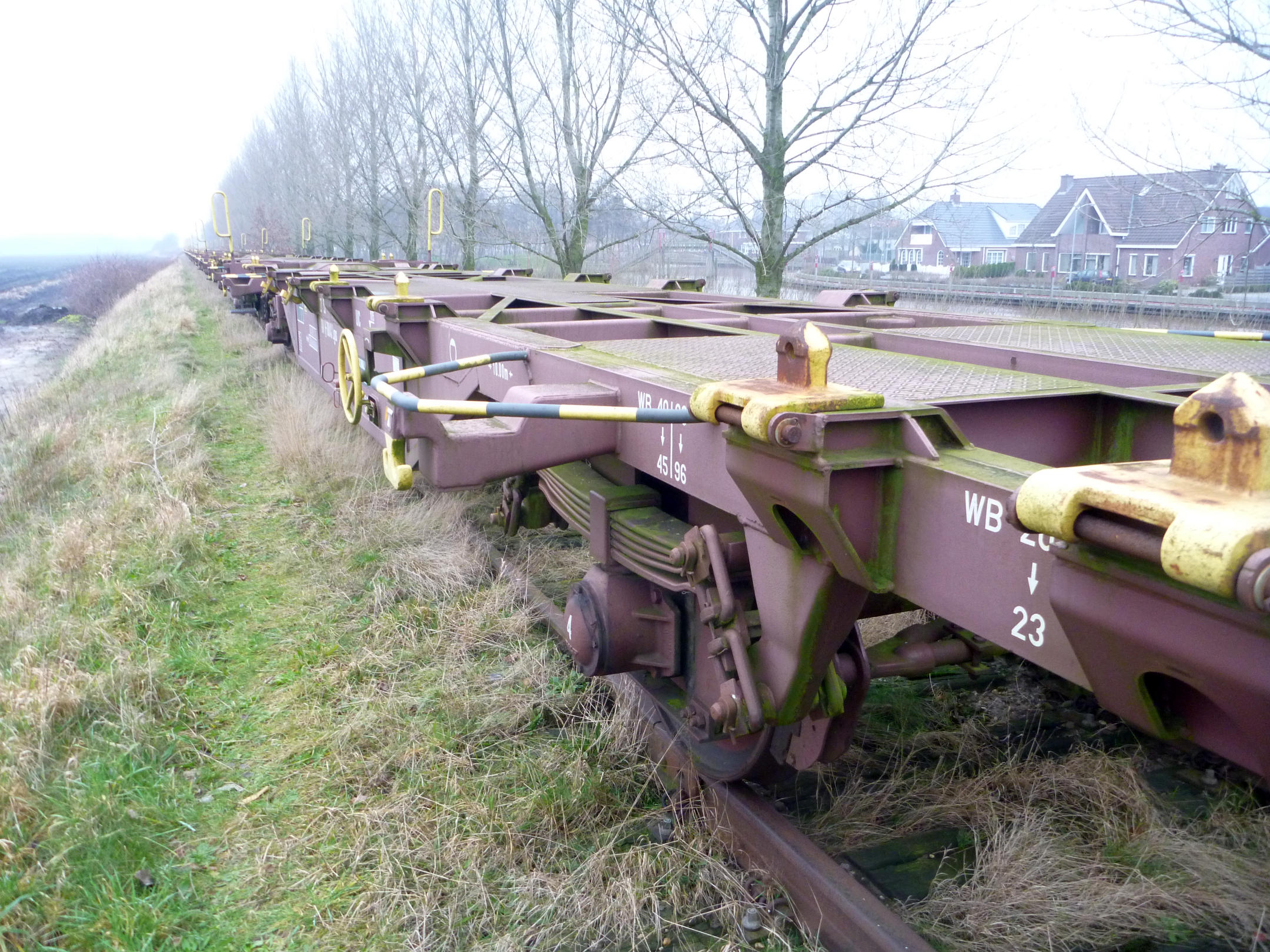 Een deel van de historische Spoorlijn Stadskanaal - Ter Apel Rijksgrens, geopend in 1924, en twee jaar later alweer gesloten.